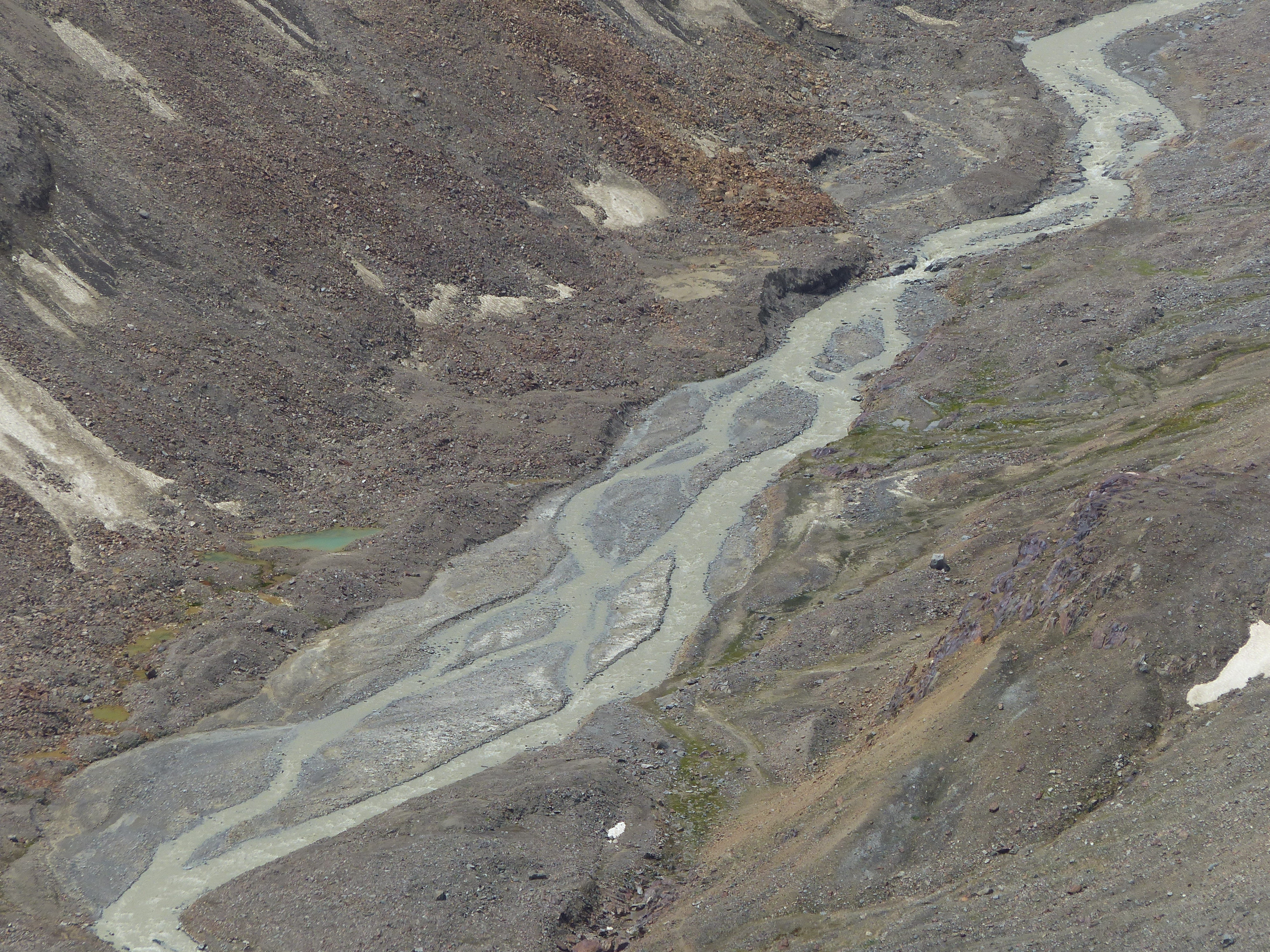 Rofenache nahe dem Hintereisgletscher